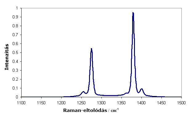 CO2 Raman eltolódása